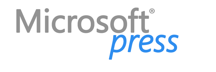 Das aktuelle Logo von Microsoft Press